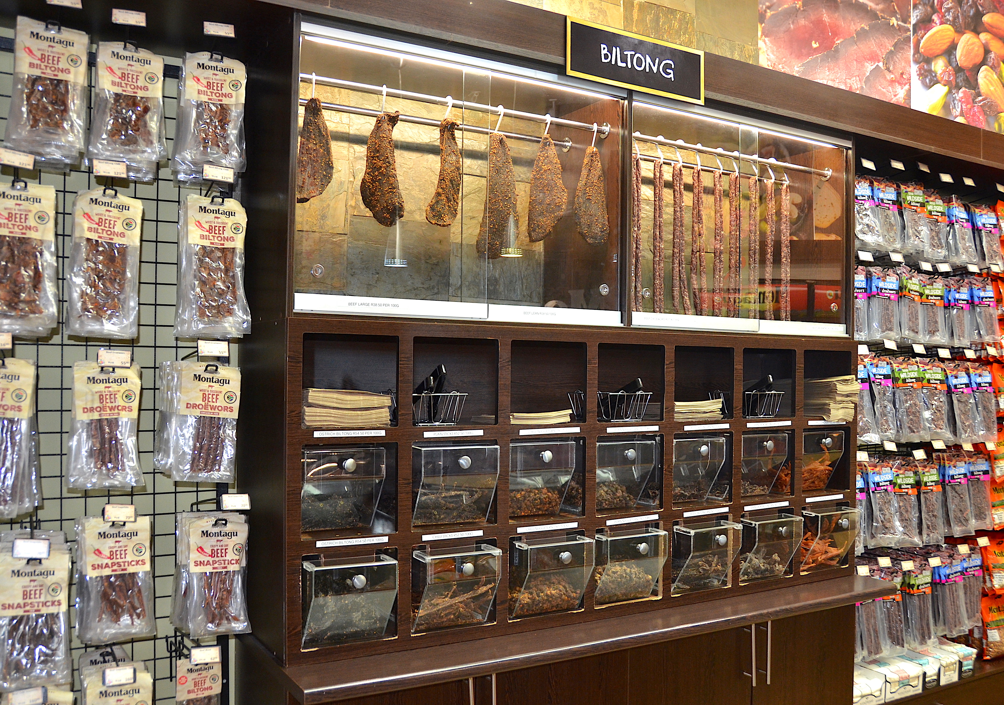 Verschiedene Sorten Biltong und Droëwors in Südafrika